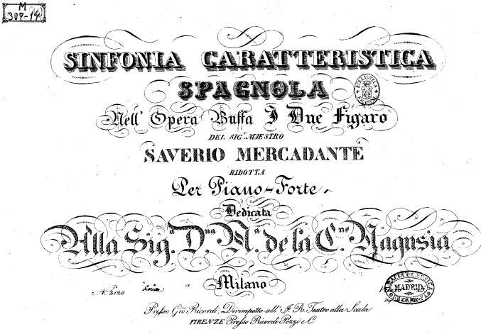 Portada de la Sinfonia caratteristica spagnola nell'opéra buffa I due Figaro del Sigr. maestro Saverio Mercadante